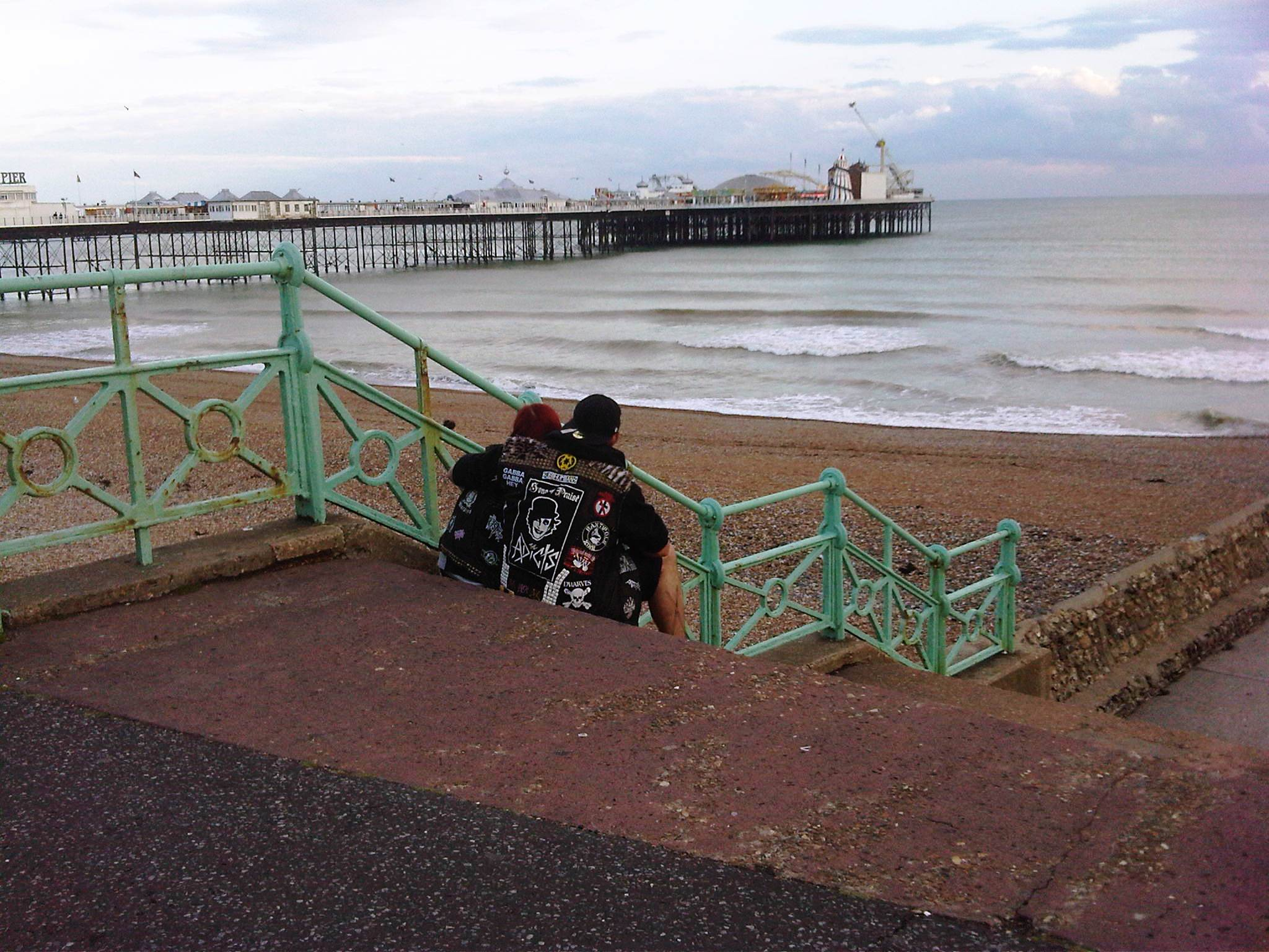 La plage de Brighton (UK) avec vue sur le Brighton Pier le 30 août 2012